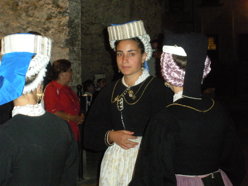 Ragazze in costume tipico alla festa "Ju Catenacce" - Scanno (AQ) Foto personale